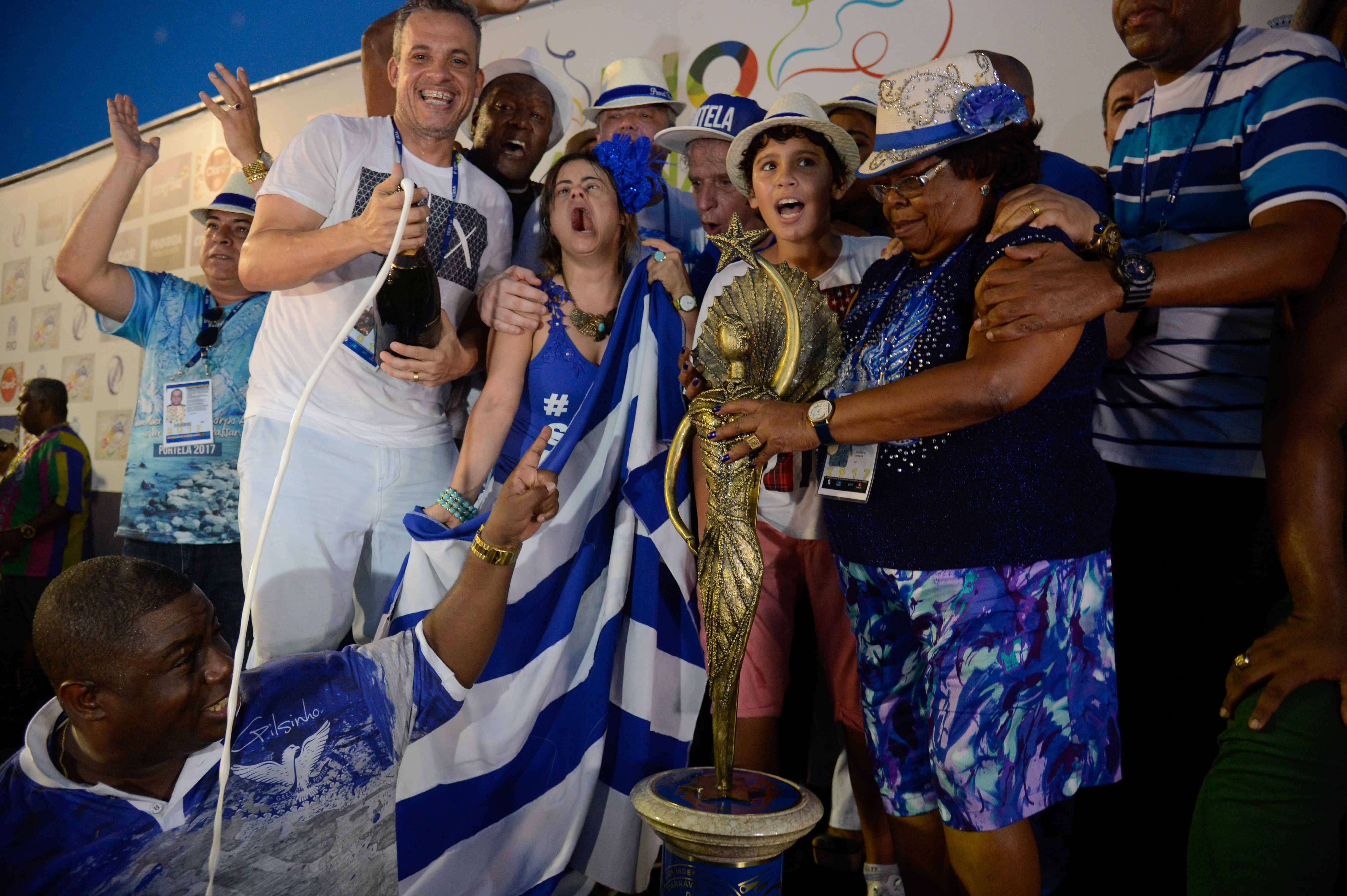 Rio de Janeiro - A escola de samba Portela é a campeã do desfile das escolas do Grupo Especial no Sambódromo (Fernando Frazão/Agência Brasil)